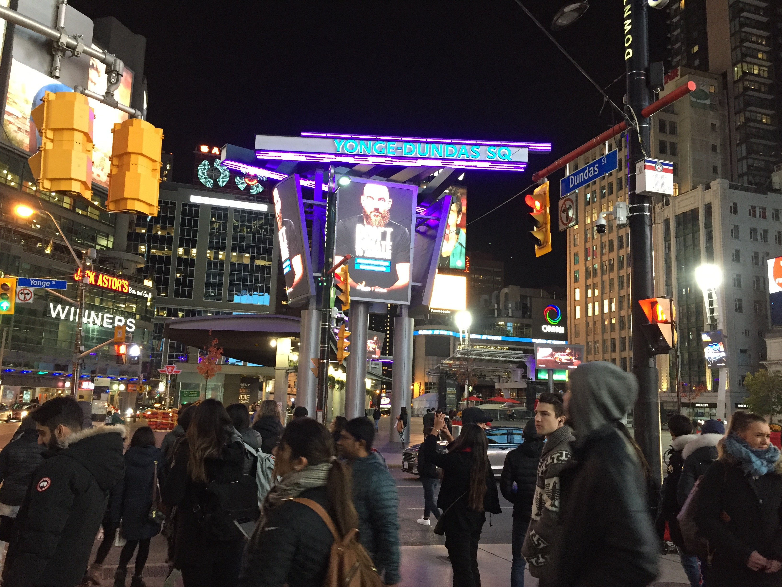 کوردی: گۆڕەپانی یانگ و دەنداس لە تۆرەنتۆ